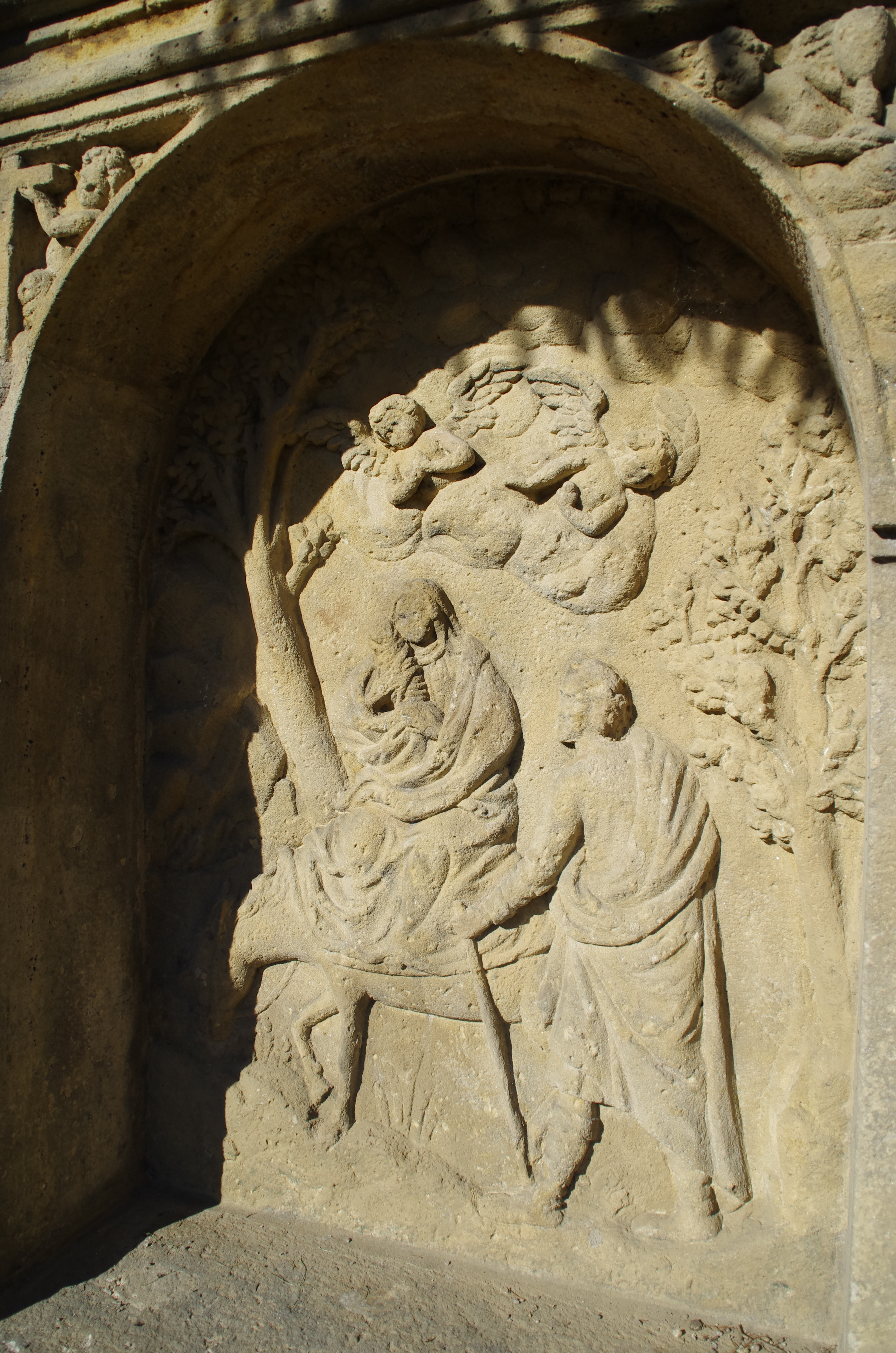 Součást cyklu výklenkových kaplí Sedm bolestí Panny Marie, nachází se v zámeckém parku v Klášterci nad Ohří